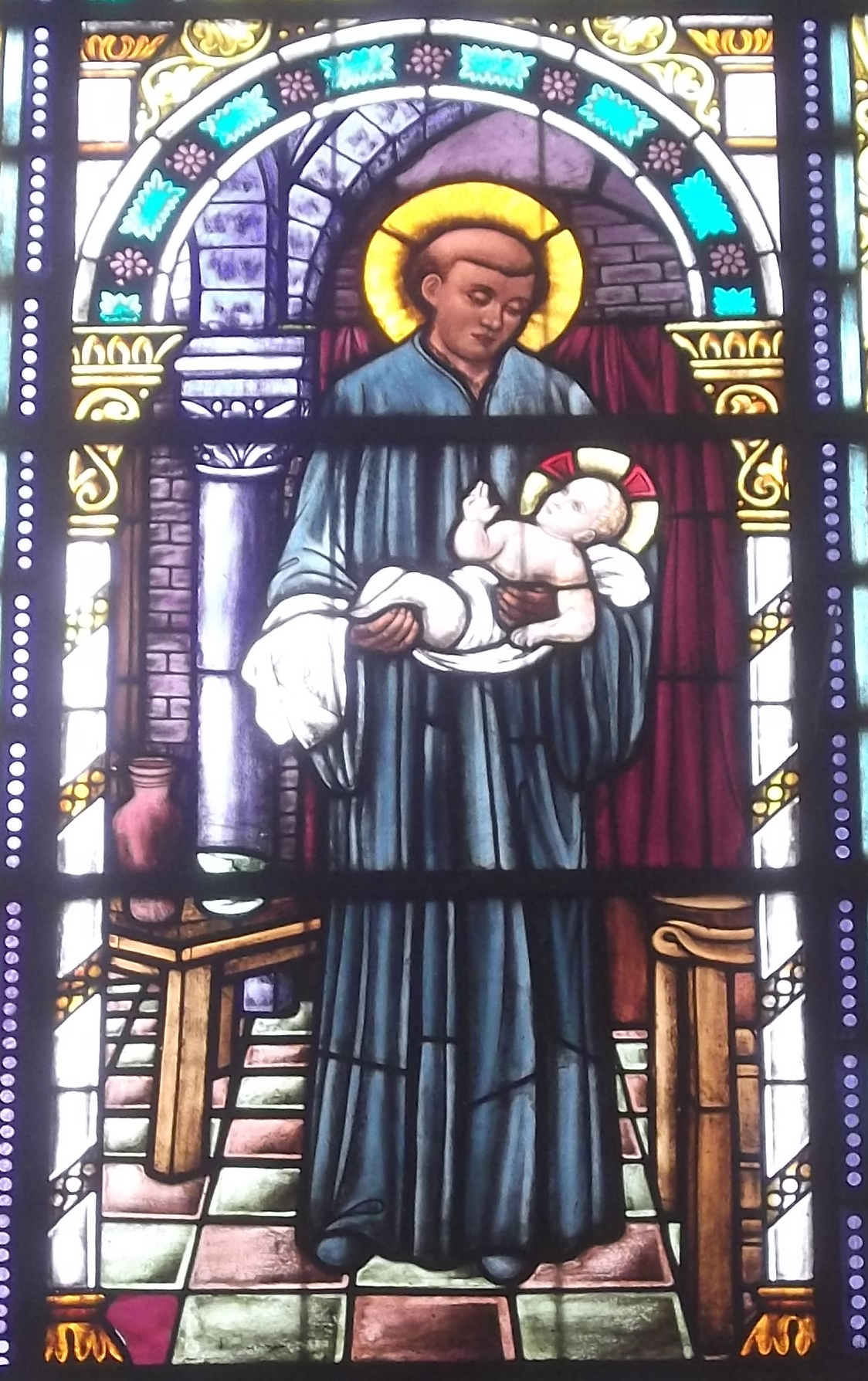 Capela do Divino Espírito Santo em Porto Alegre